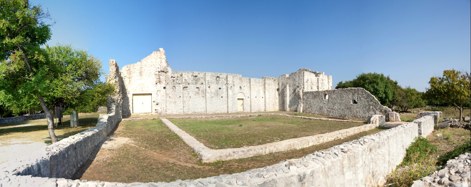 Ranokršćanski kompleks na lokalitetu Mirine u uvali Sepen blizu Omišlja. Ostaci velike ranokršćanske bazilike, s kraja V. ili početka VI. stoljeća. Građevina se spominje i kao benediktinski samostan sv. Nikole koji je napušten u XV. stoljeću.